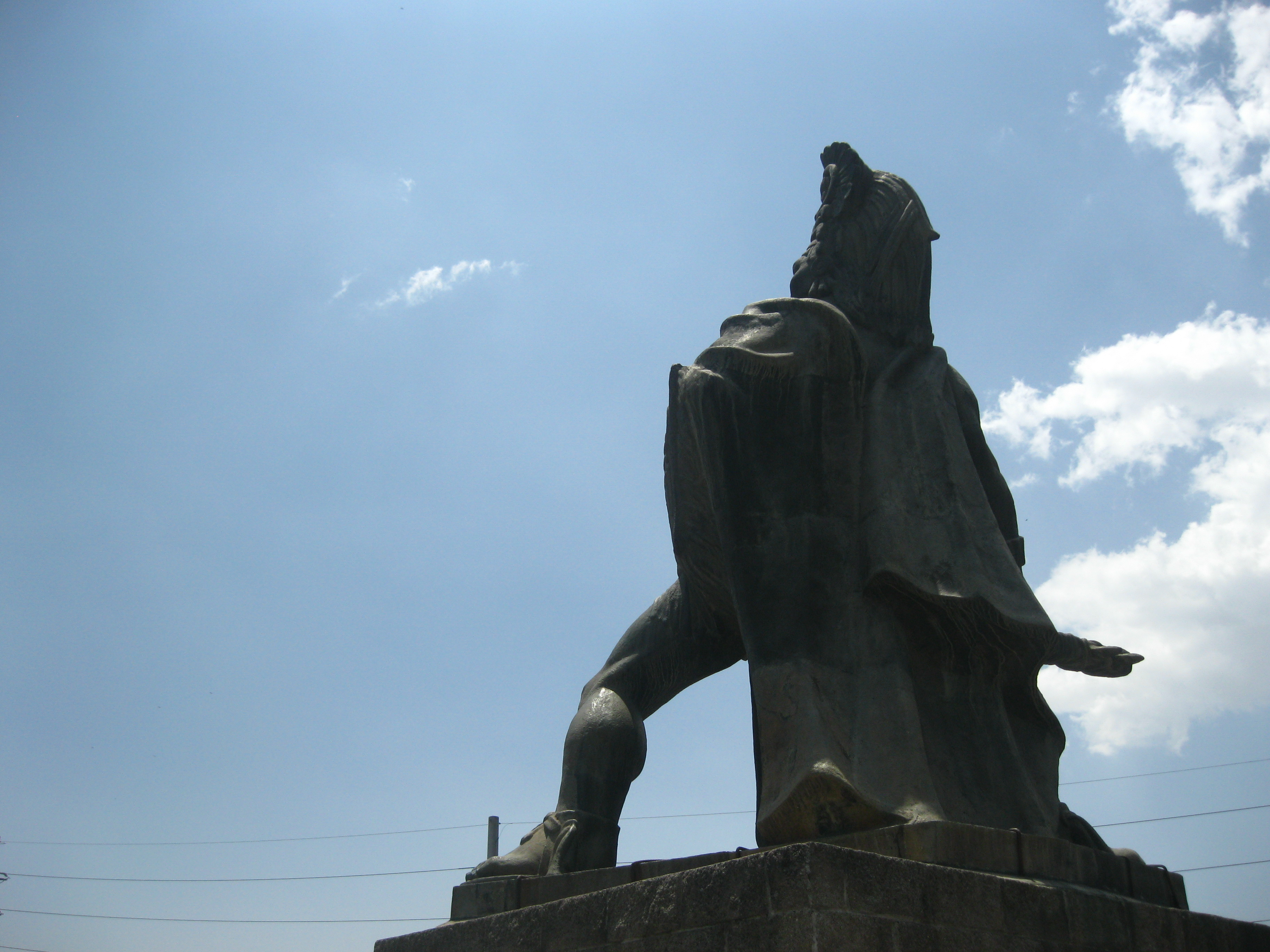 Estatua a Tecun Uman en la Ciudad de Quetzaltenango, Guatemala